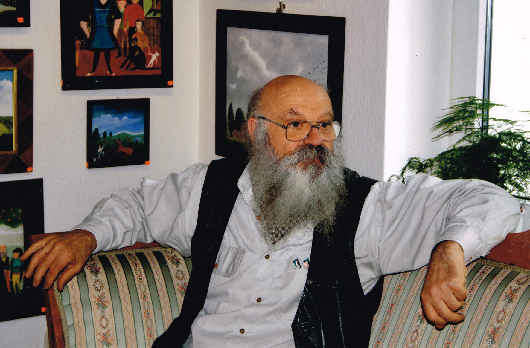 Bild des Malers Ulrich Pietzsch